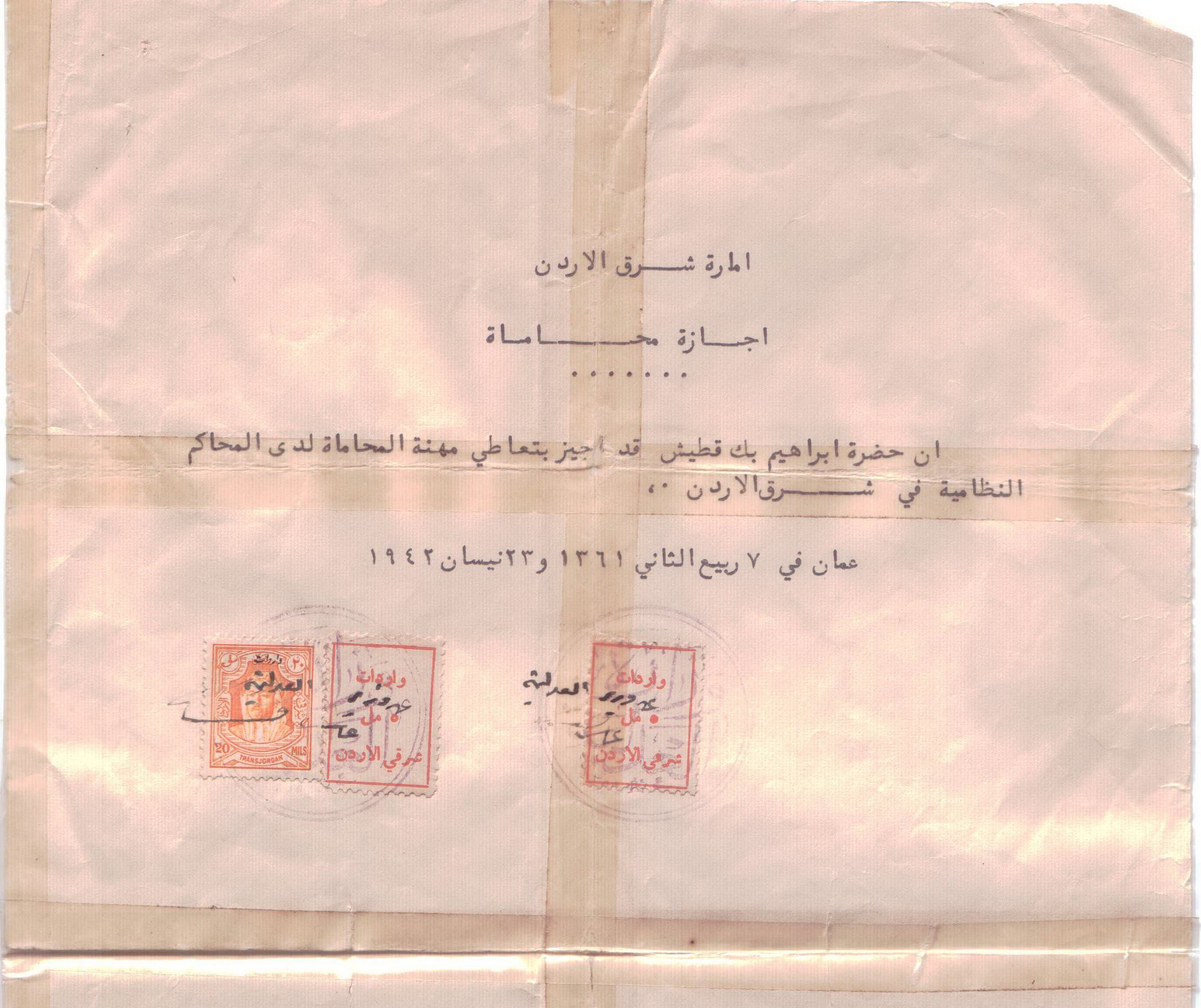 من المحاميين الأوائل - كتاب مزاولة المحاماه